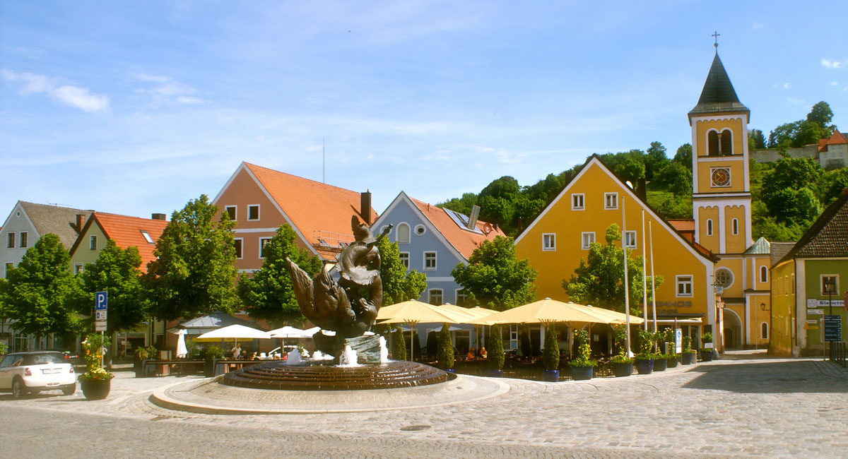 Altstadthäuser am Marktplatz von Burglengenfeld